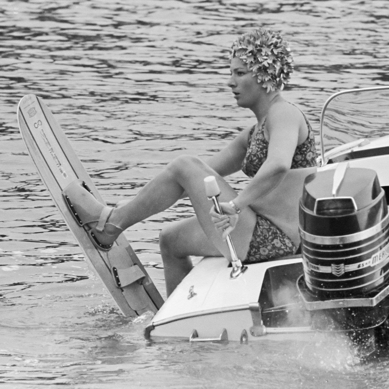 Europese Waterskikampioenschappen op de Bosbaan. De Luxemburgse Sylvie Hulsemann is gevallen 10 augustus 1967